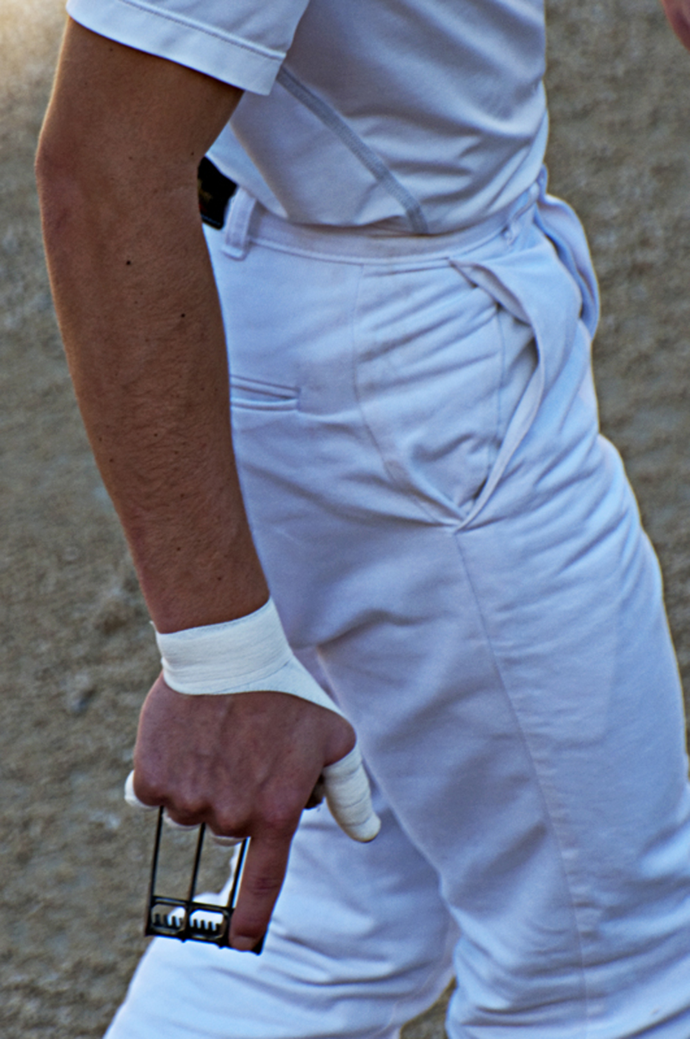 Razeteur prêt à défier le taureau